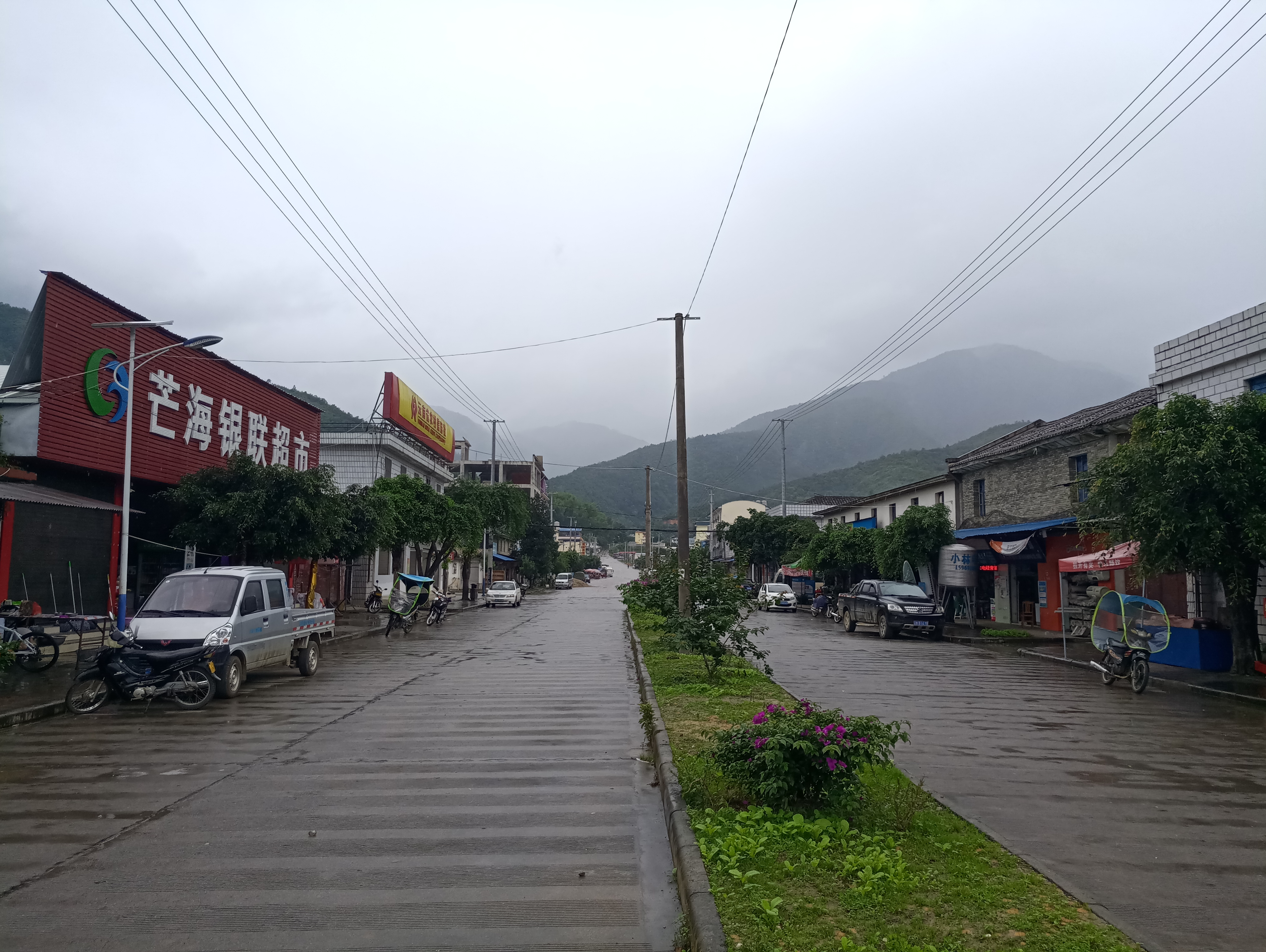 芒海镇-街道